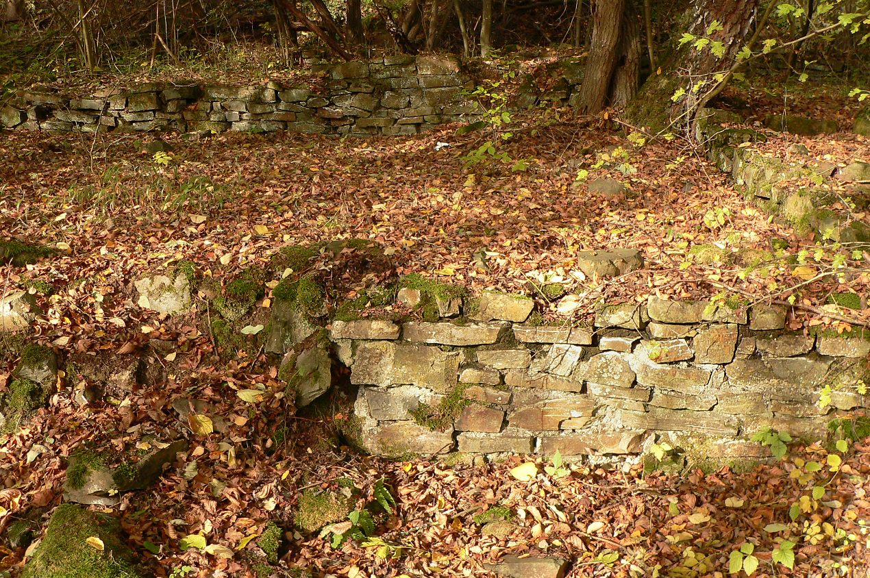 Römischer Gutshof „Im Weiler“